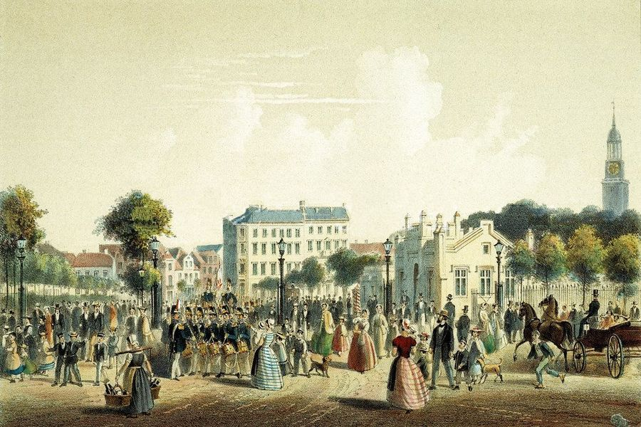 Das Holstenthor in Hamburg um 1850, gezeichnet von J. Gottheil, gestochen von J. Poppel und G. Kurz